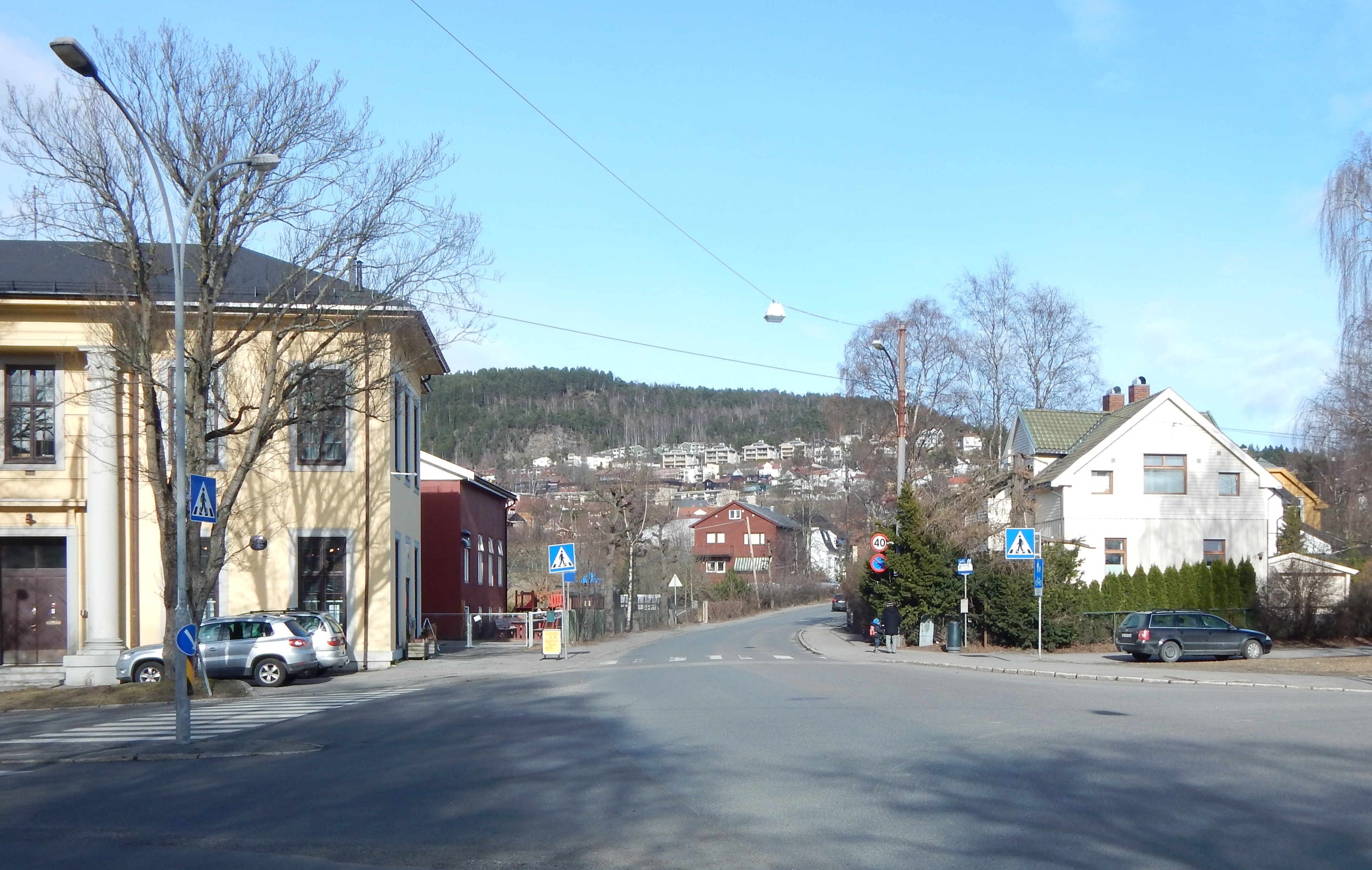 Kjelsåsveien nordøstover fra krysset med Lettvintveien og Lofthusveien